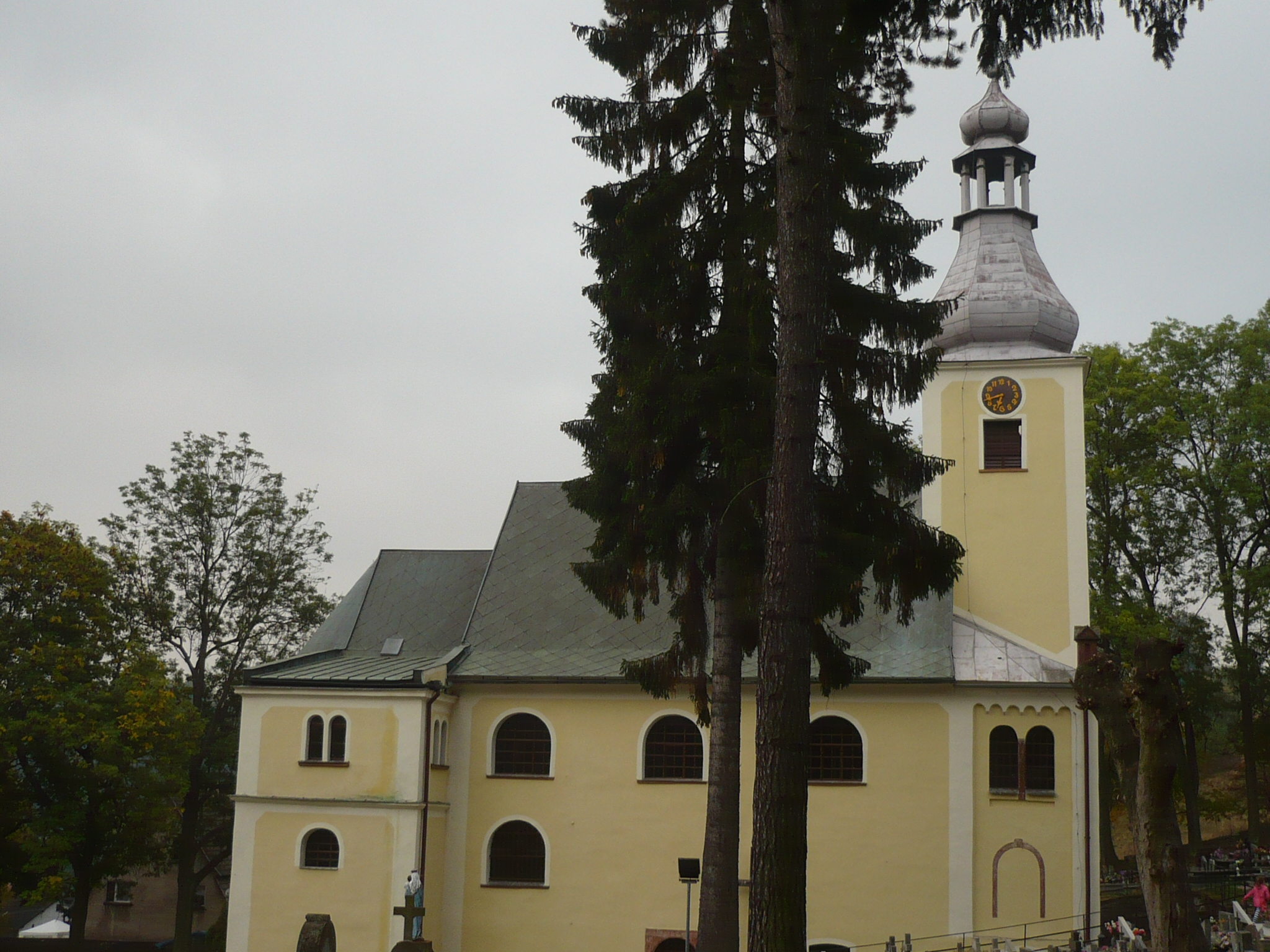 Ludwikowice Kłodzkie. Kościół pw. św. Michała Archanioła